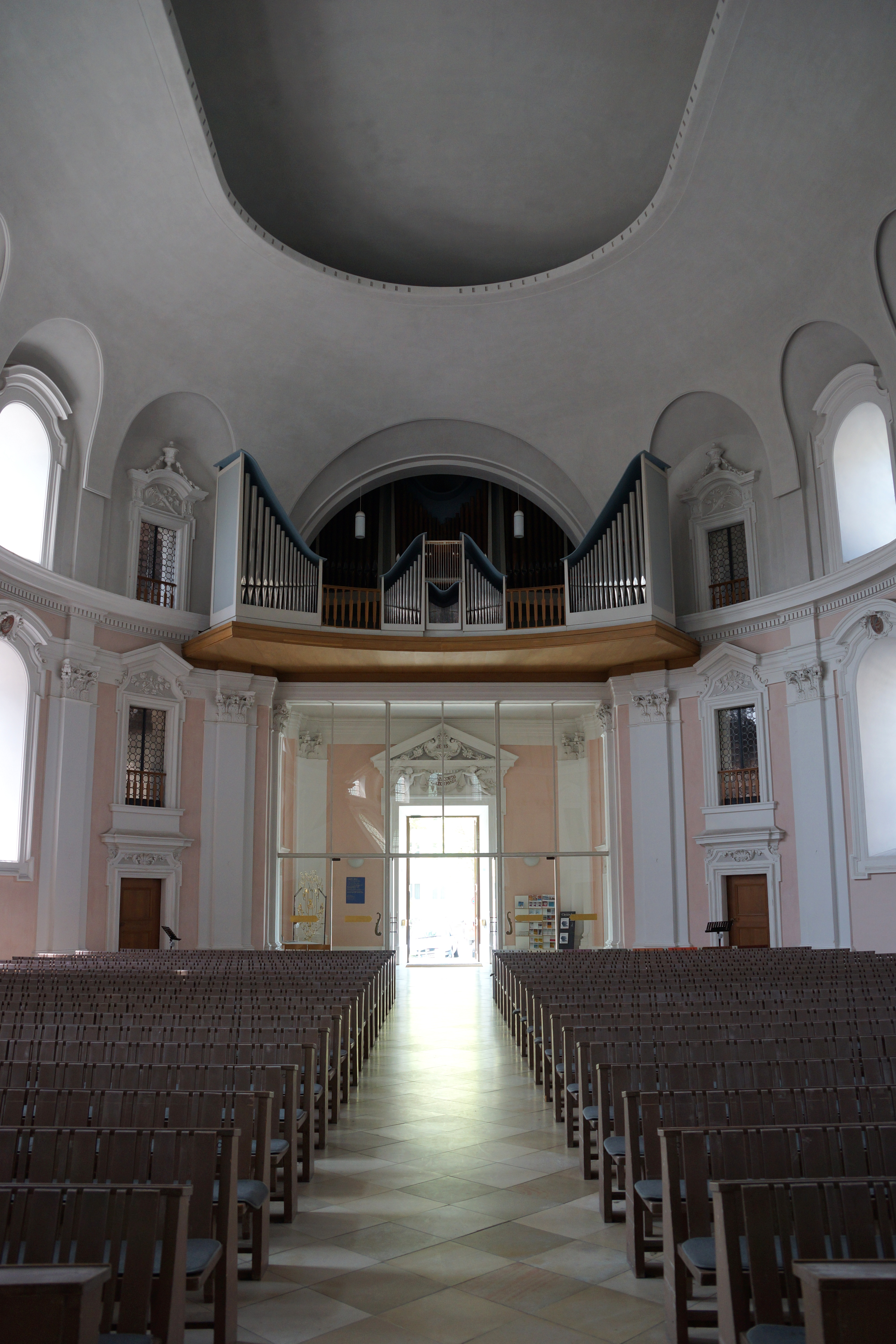 St. Egidien / Egidienkirche in Nürnberg